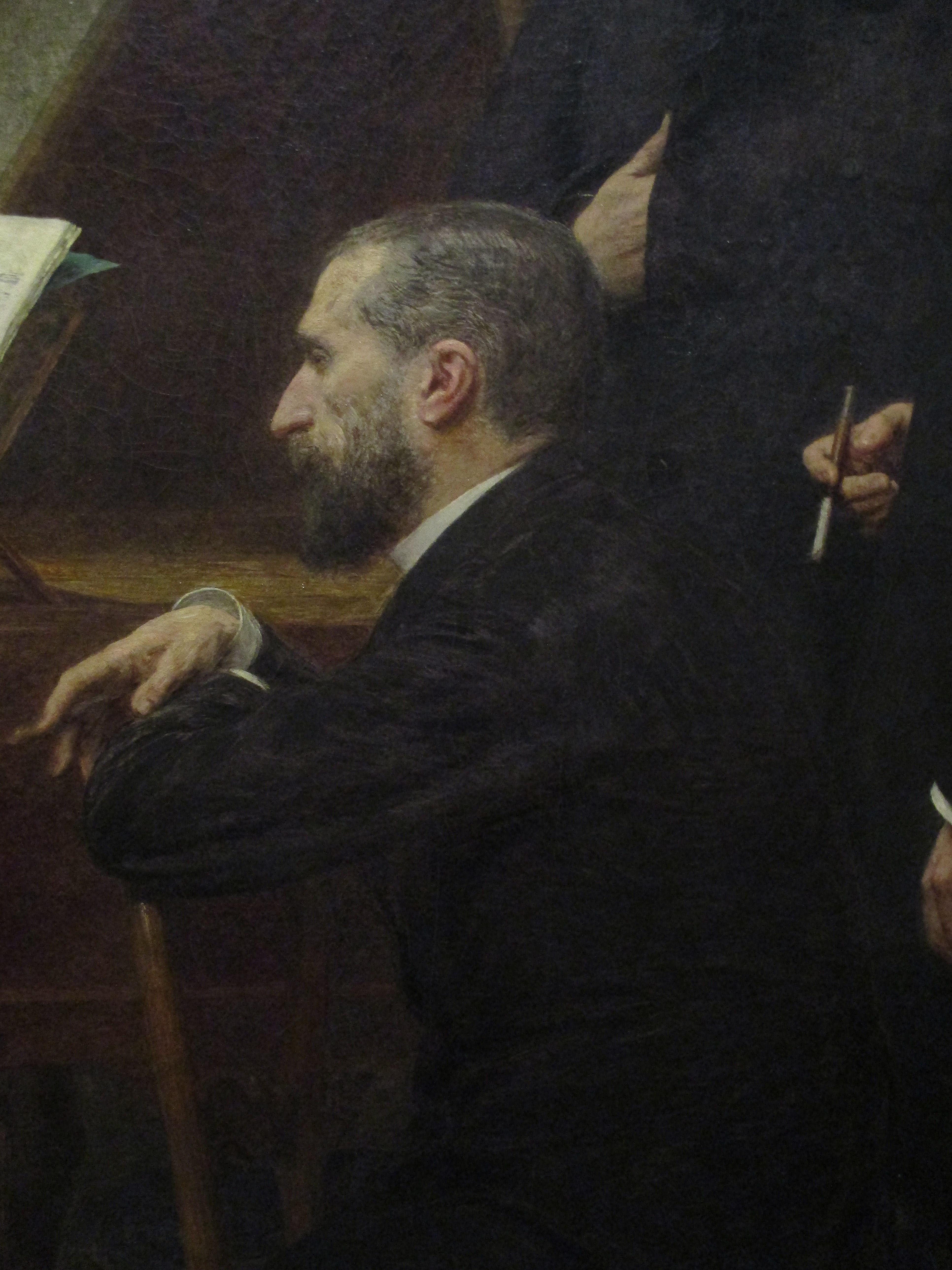 Edmond Maître par Henri Fantin-Latour, détail du tableau Autour du piano (1885), musée d'Orsay.